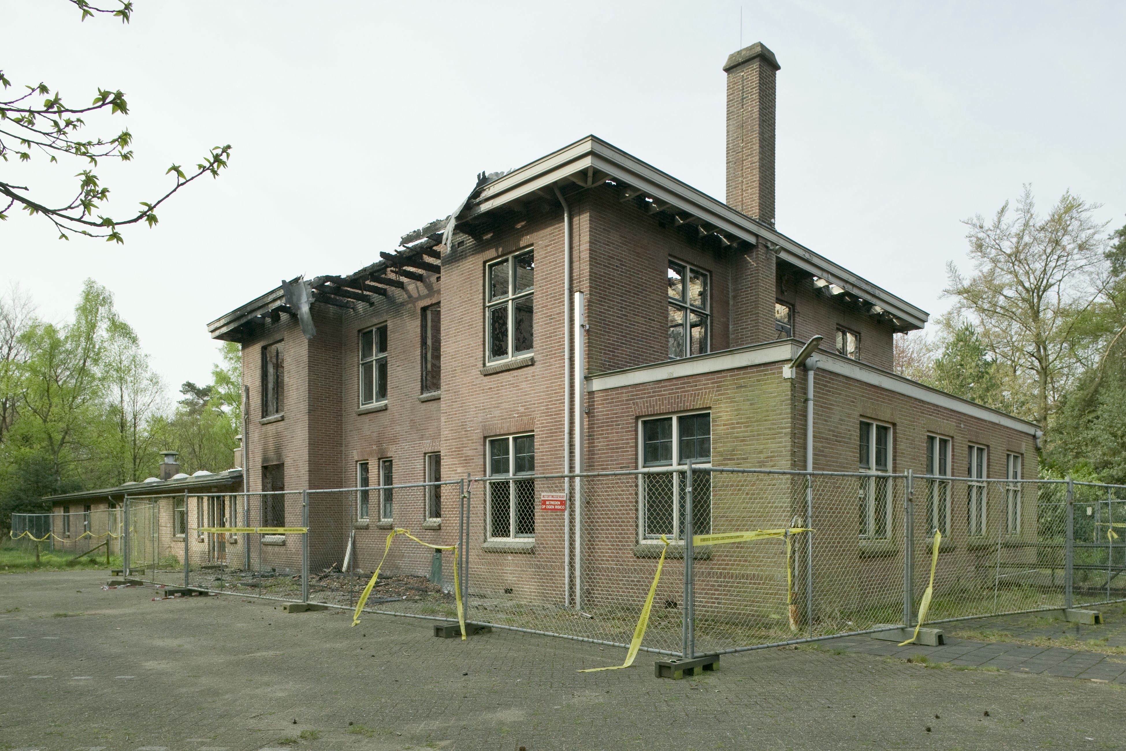 Complex Radio Kootwijk: Overzicht gebouw F in vervallen toestand: voorzijde en rechter zijgevel (opmerking: Deze opdracht gaat vooral om de bijgebouwen bij Radio Kootwijk)